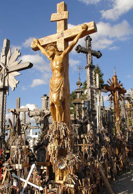 Góra krzyży - Szawle na Litwie